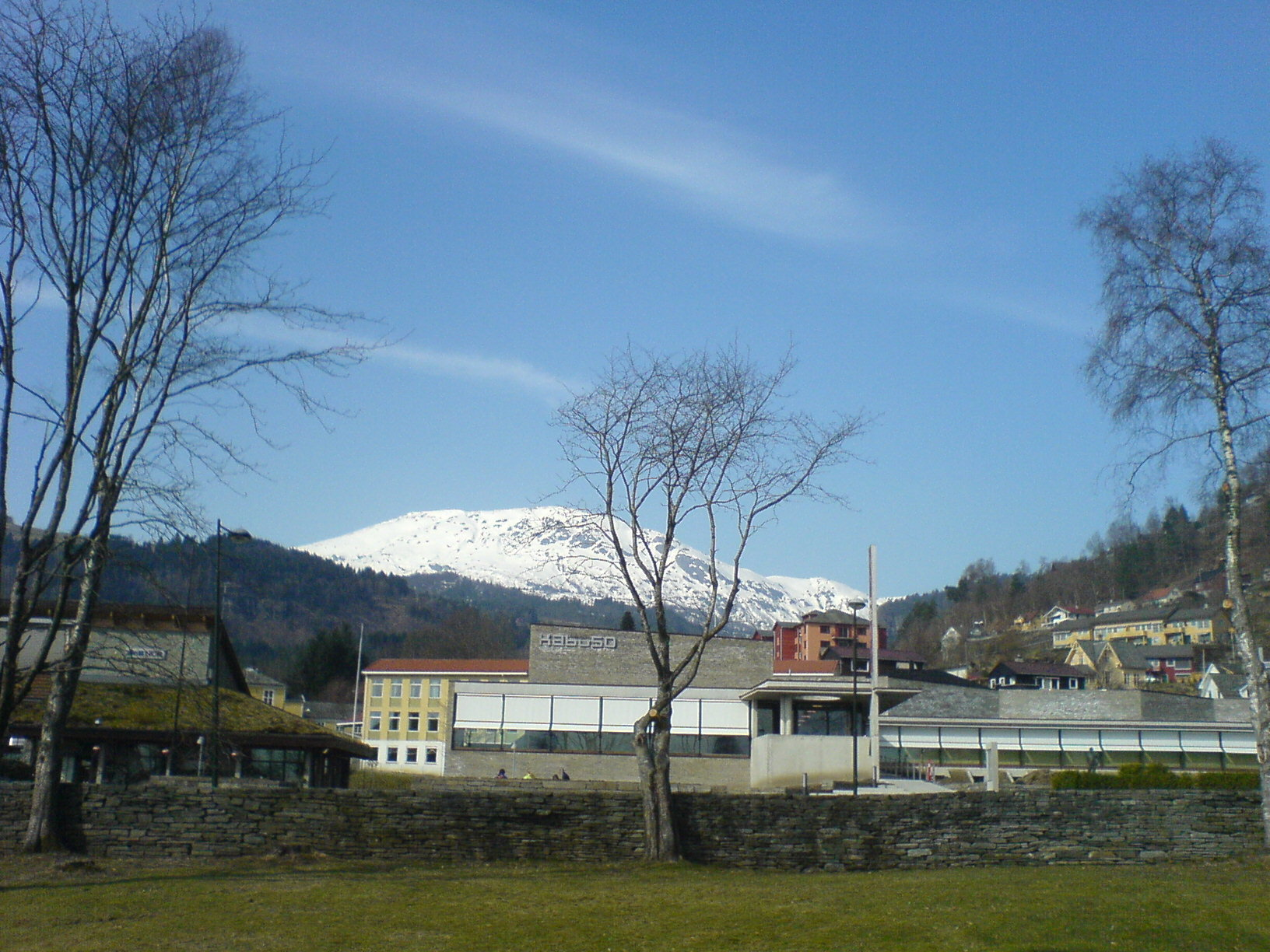 Kabuso i Øystese